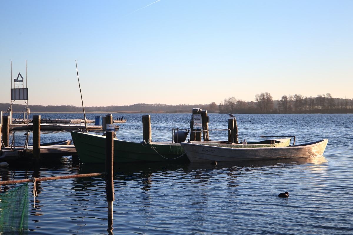 Fischerkähne in Röbel/Müritz